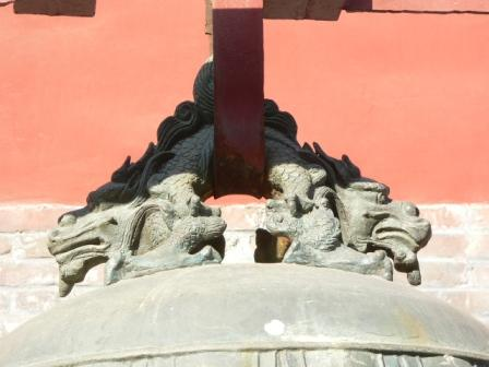 蒲牢 提钮 拍摄